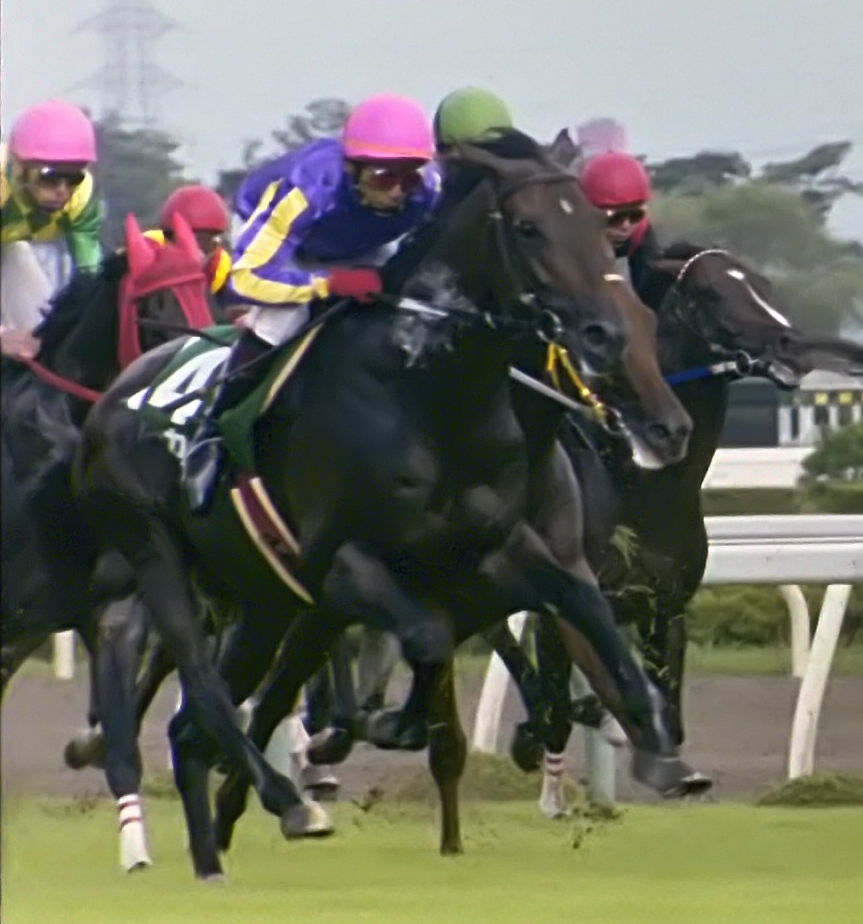 ゴーカイ 1999年8月28日 新潟競馬場